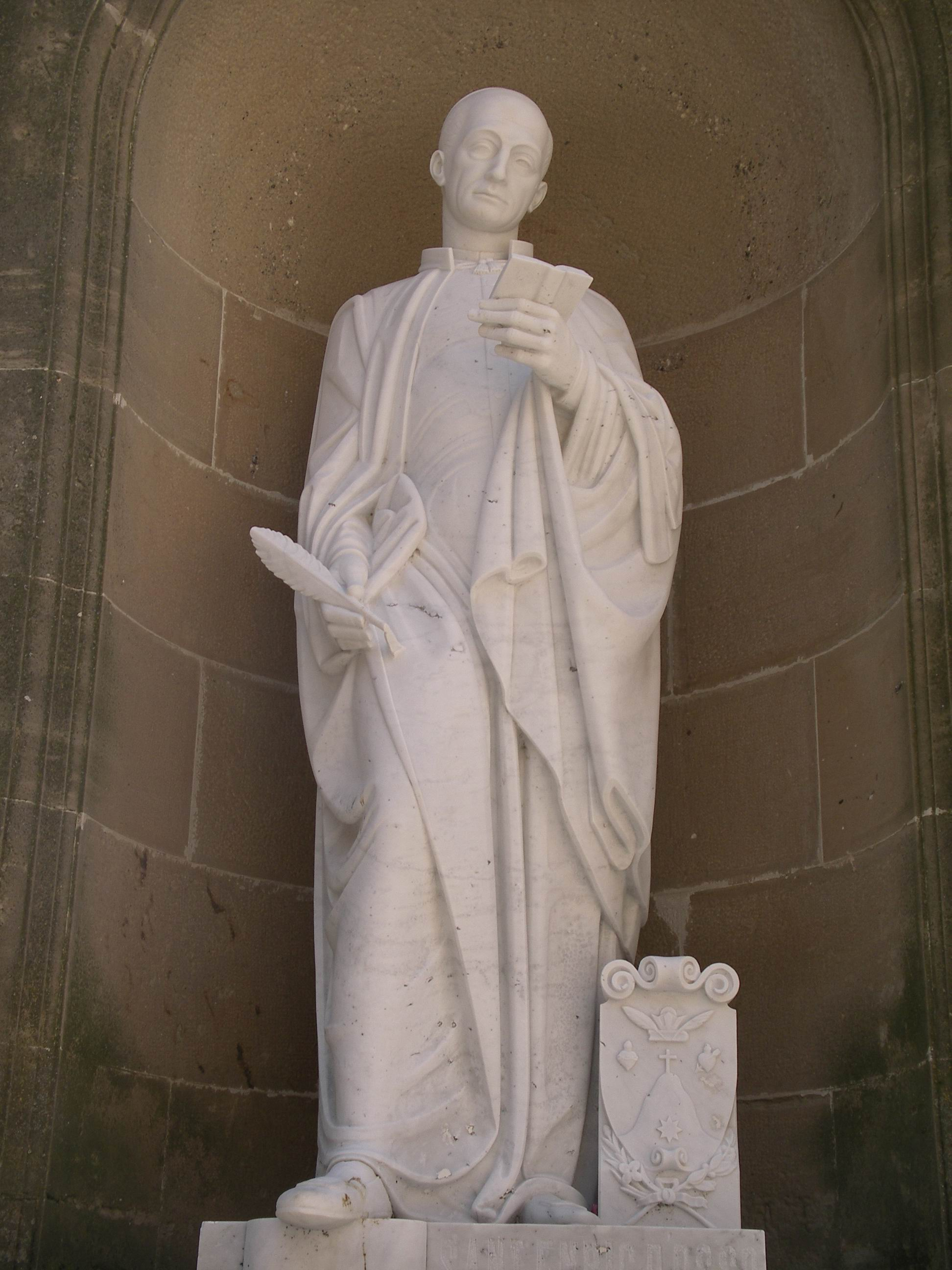 Sant Enric d'Ossó, a les places del monestir, Abadia de Montserrat